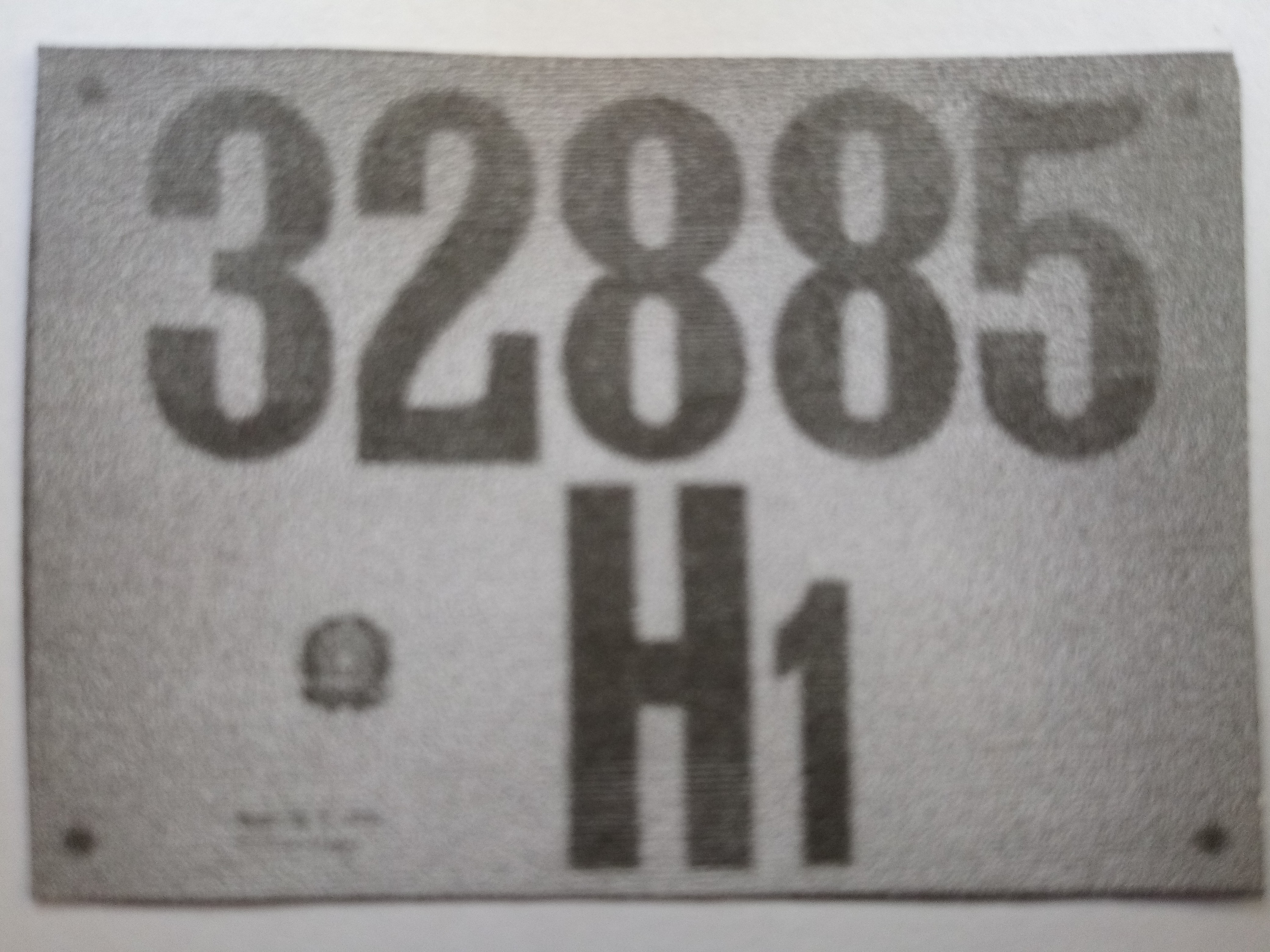 La foto è stata da me scattata una domenica di fine ottobre del 2000 in un padiglione della fiera di Padova dedicata alle auto e moto d'epoca. È stata ingrandita e migliorata la resa visiva.